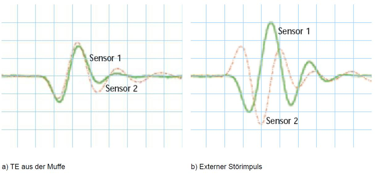 Oszilloskopaufnahme bei der TE-Messung mit Richtkoppelsensoren.